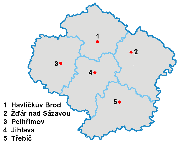 Die Bezirke des Kraj Vysocina in Tschechien